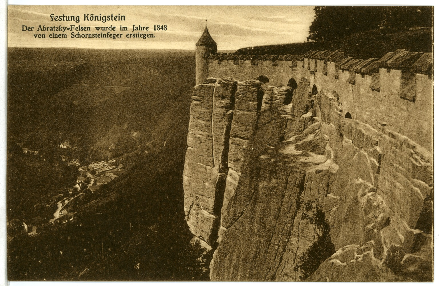 Königstein; Festung mit Abratzkyfelsen This postcard is from publisher Brück & Sohn in Meißen ( postcard has a unique number 08585 and is available in a higher resolution at the publisher. This images was uploaded in a cooperation project between Wikipedians and the publisher.